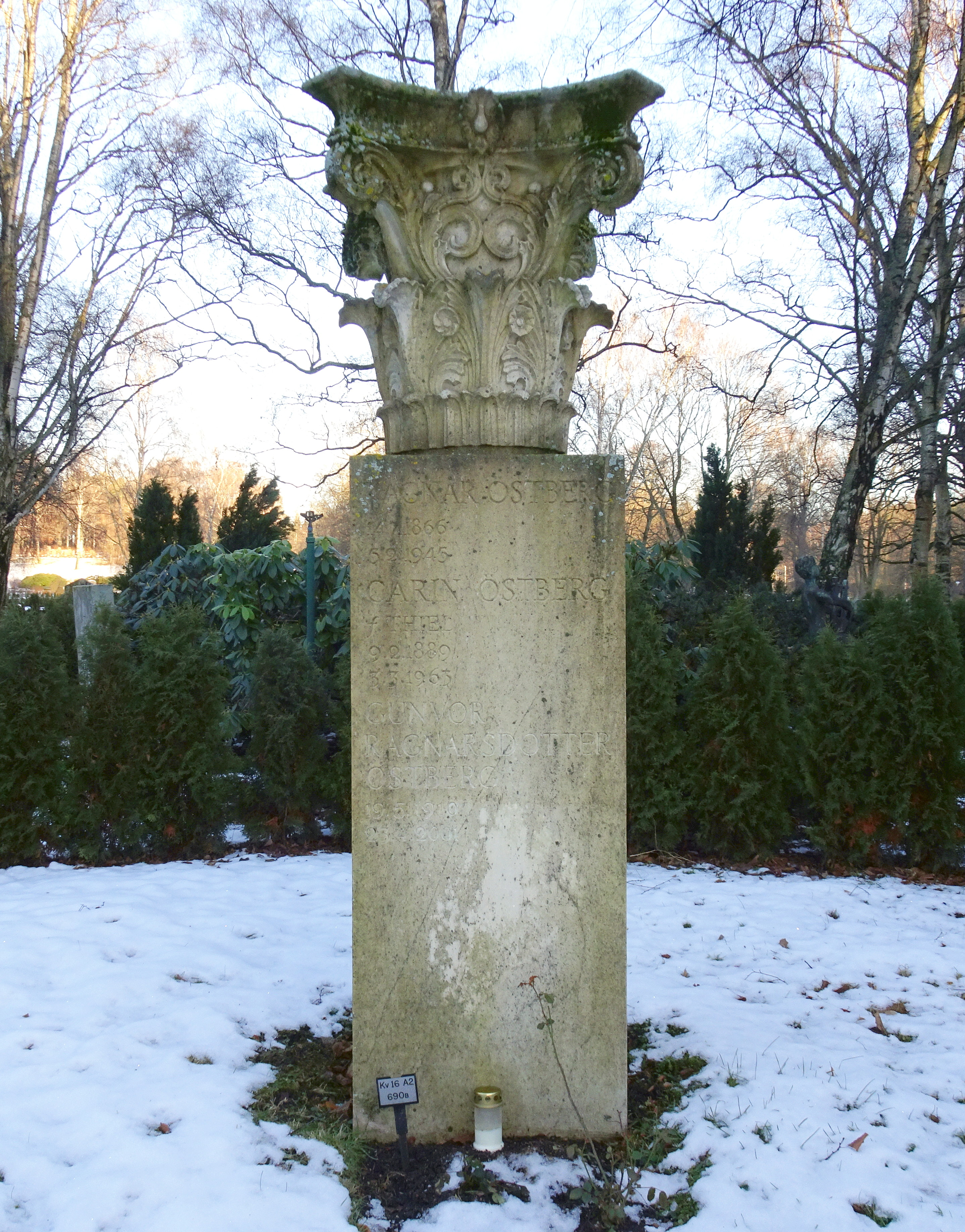 Ragnar Östberg, gravvård på Norra Begravningsplatsen. Konstnär David Dahl, 1953.